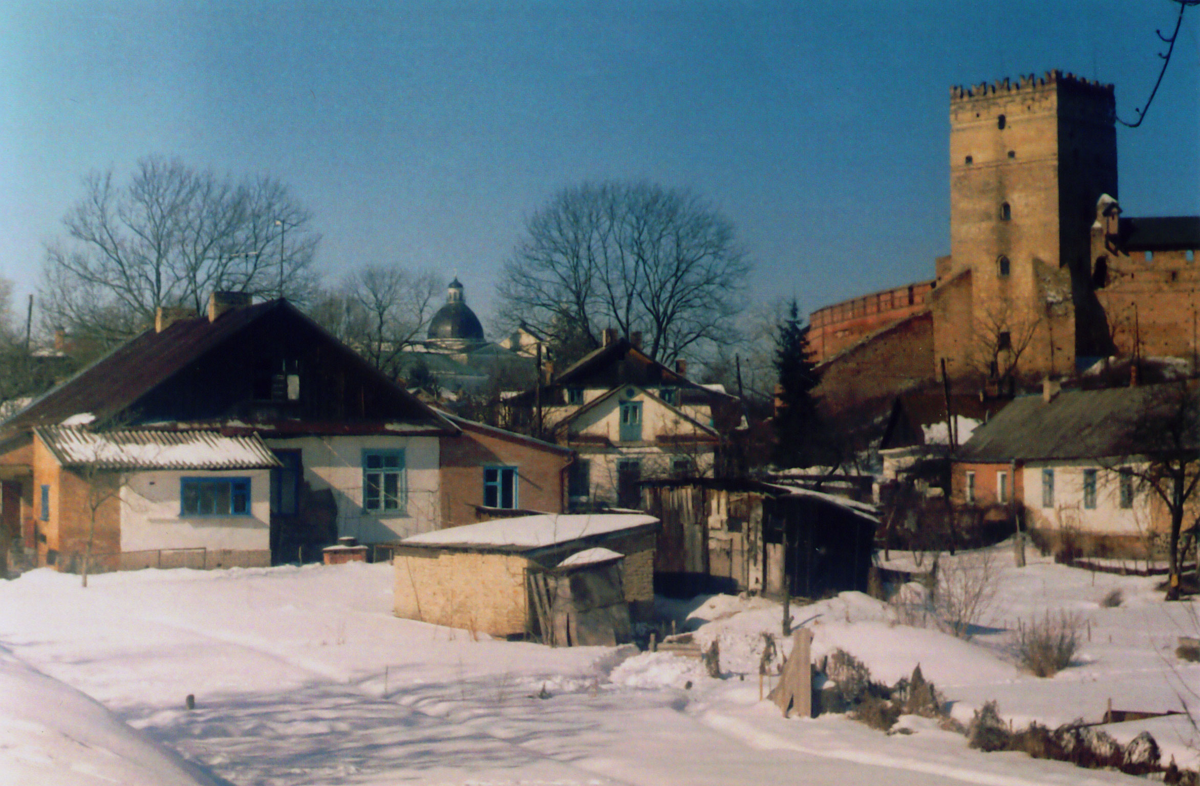 Категория:Замки Украиныru:Категория:Луцк